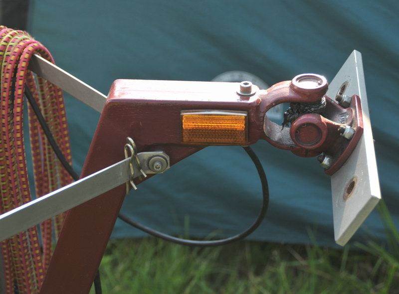 Kreuzgelenk-Kupplung für Einspuranhänger